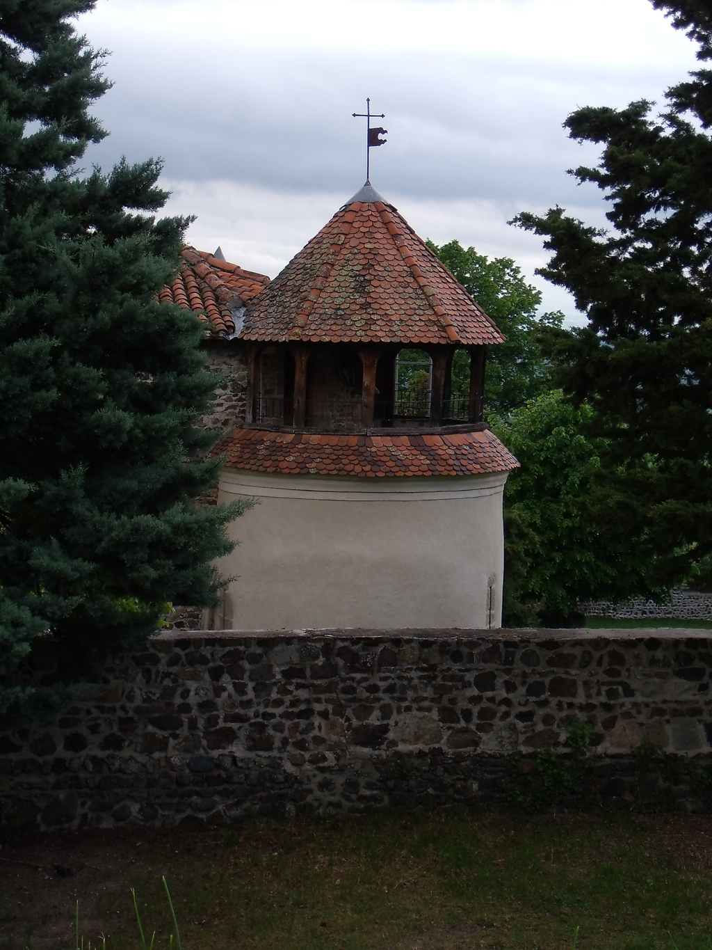 Château de Goutelas (commune de Marcoux), tour sud du logis dite tour campanile.